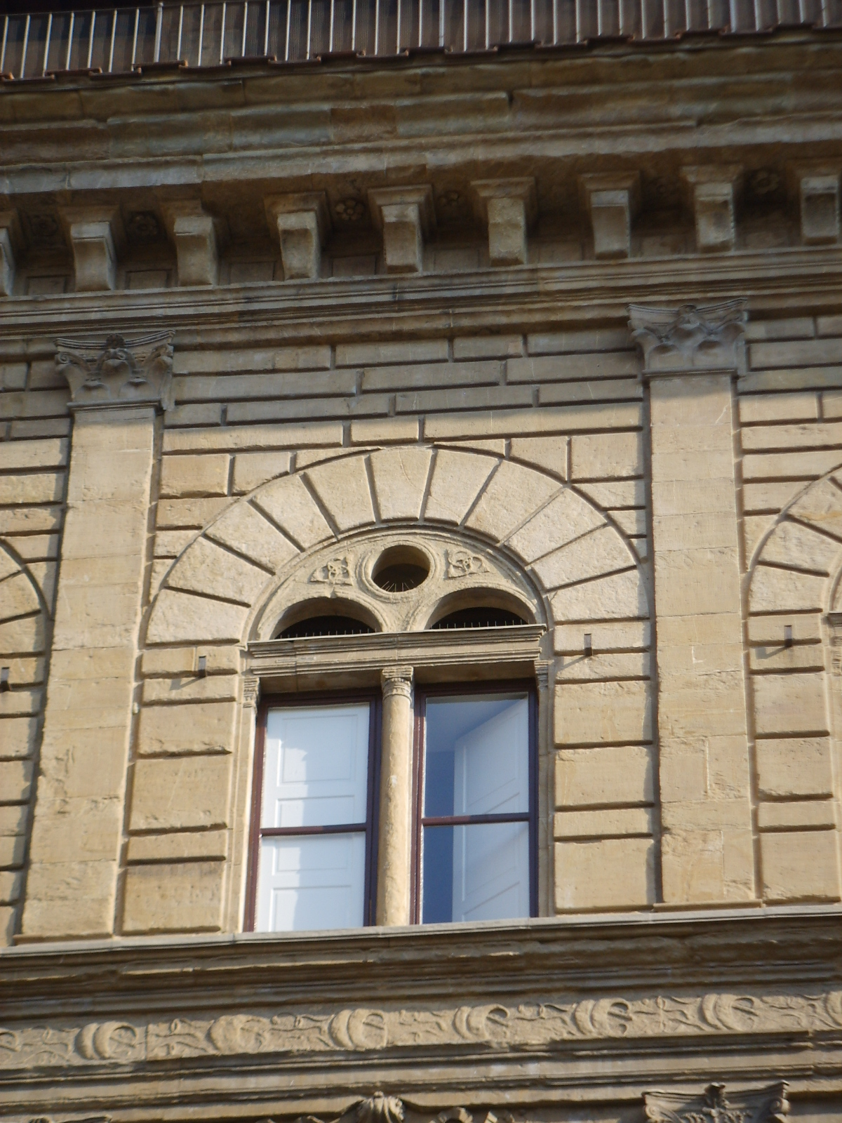 Palazzo rucellai, ordine architettonico secondo piano